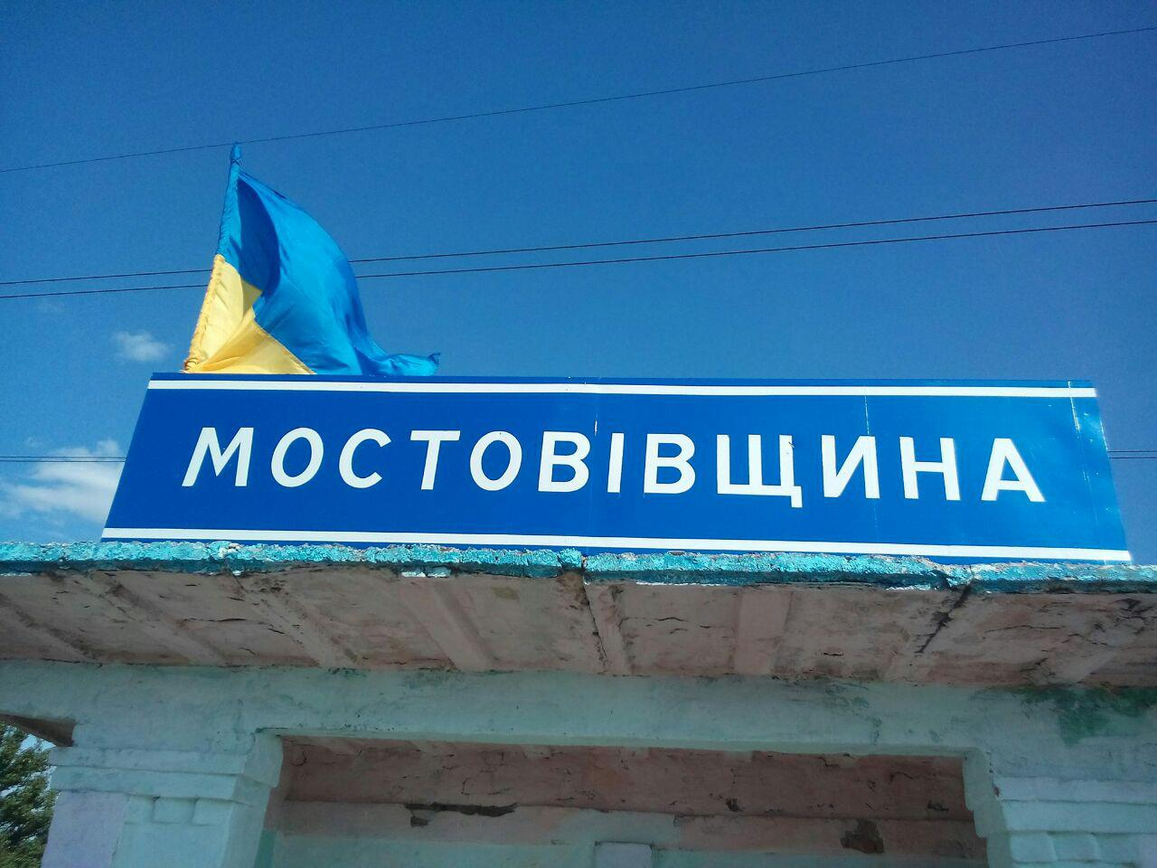 Вид на назву автобусної зупинки. День незалежності - 24 серпня 2014 року